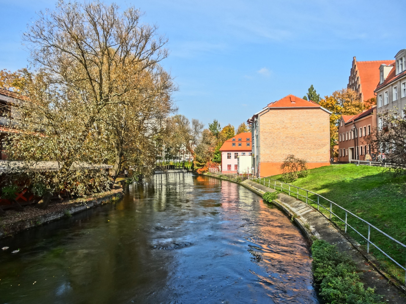 Odnoga Brdy Młynówka opływająca Wyspę Młyńską w Bydgoszczy